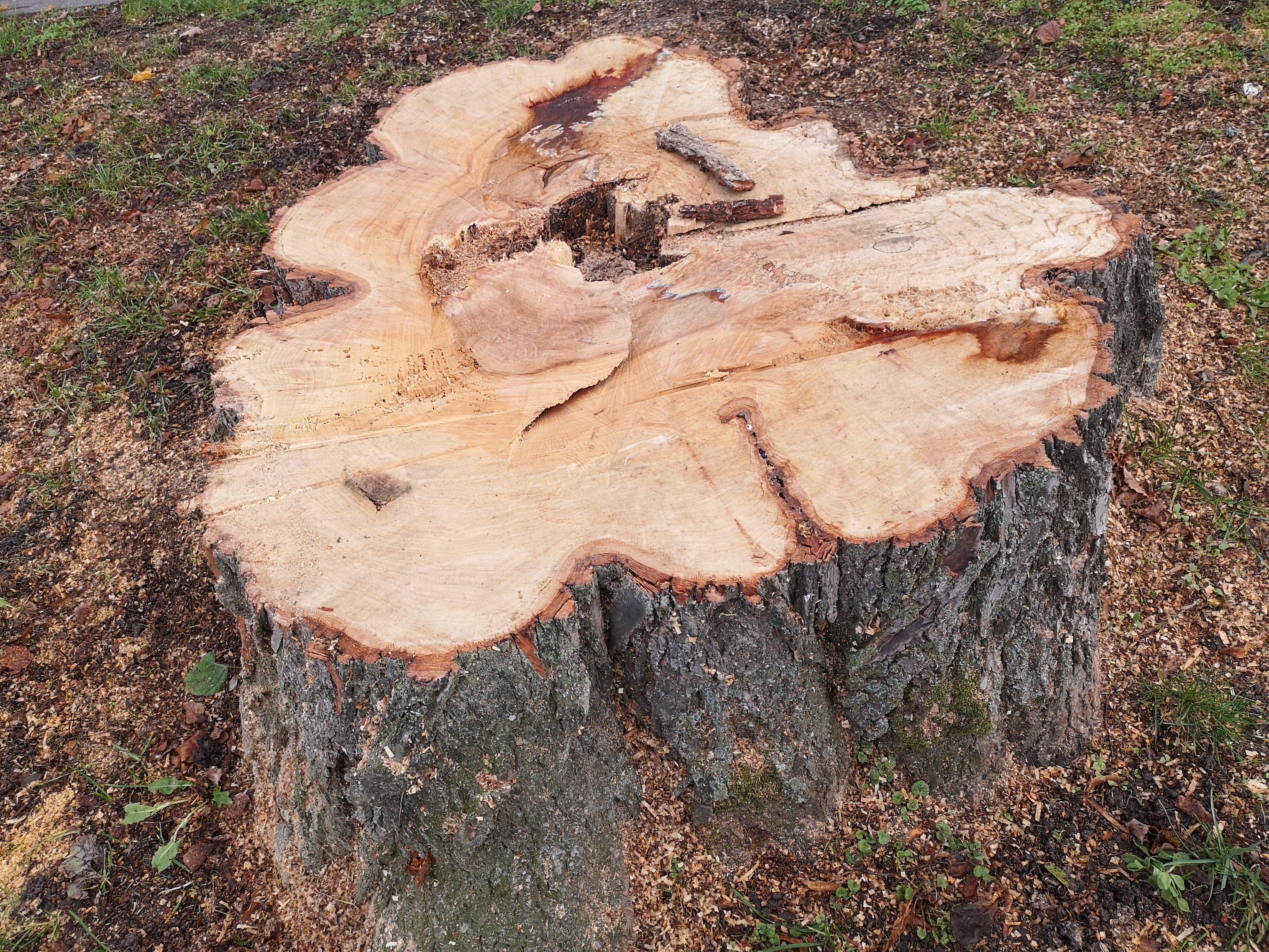 Baumstumpf der als Naturdenkmal ausgewiesenen Winterlinde am Friedhof Eschelbronn